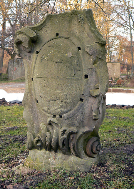 Wappen Adolphshof